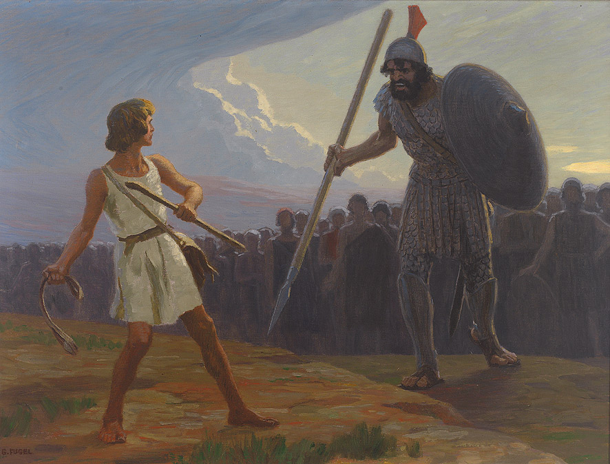 David gegen Goliath